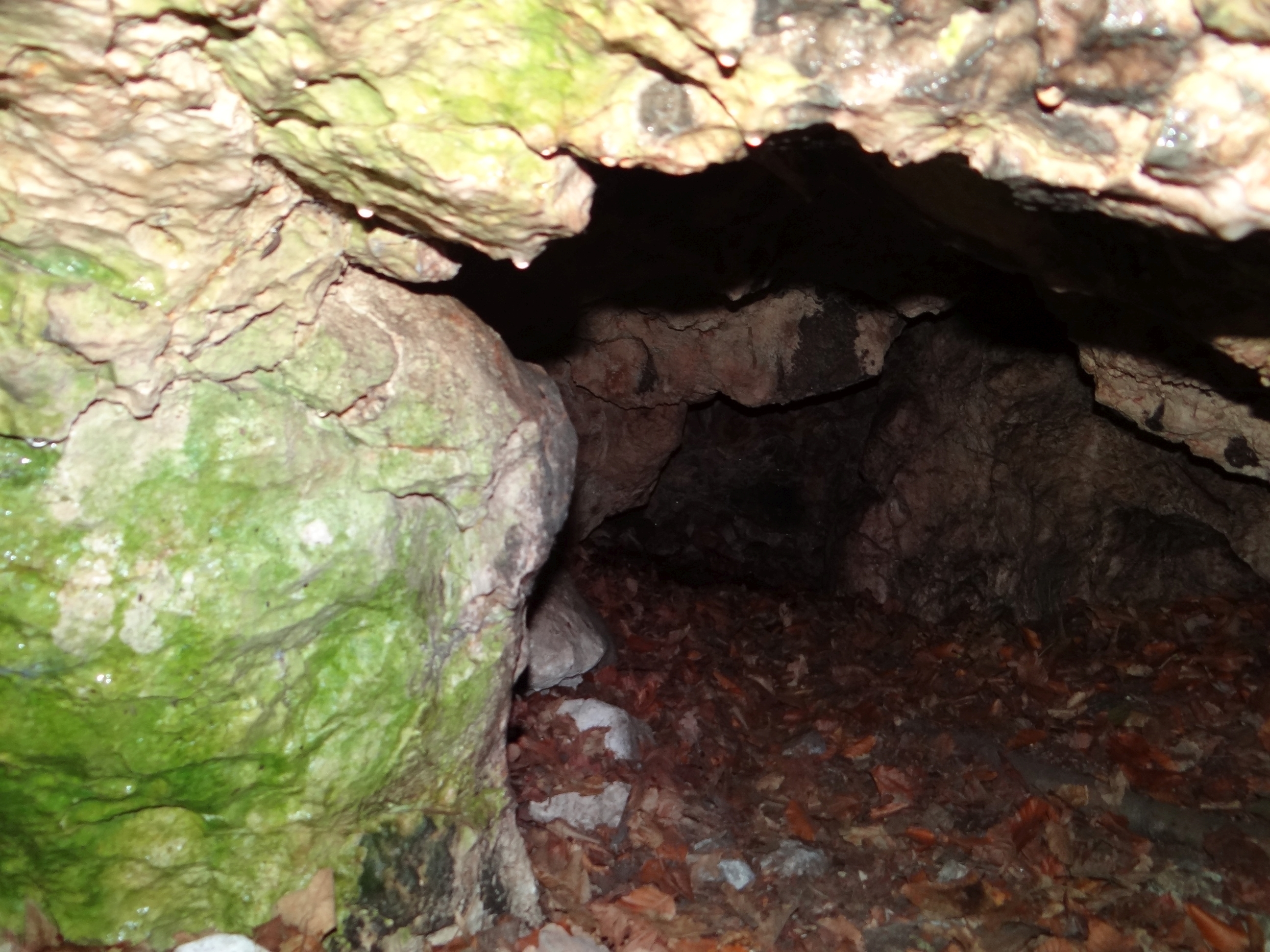 Jaskinia między Schronami